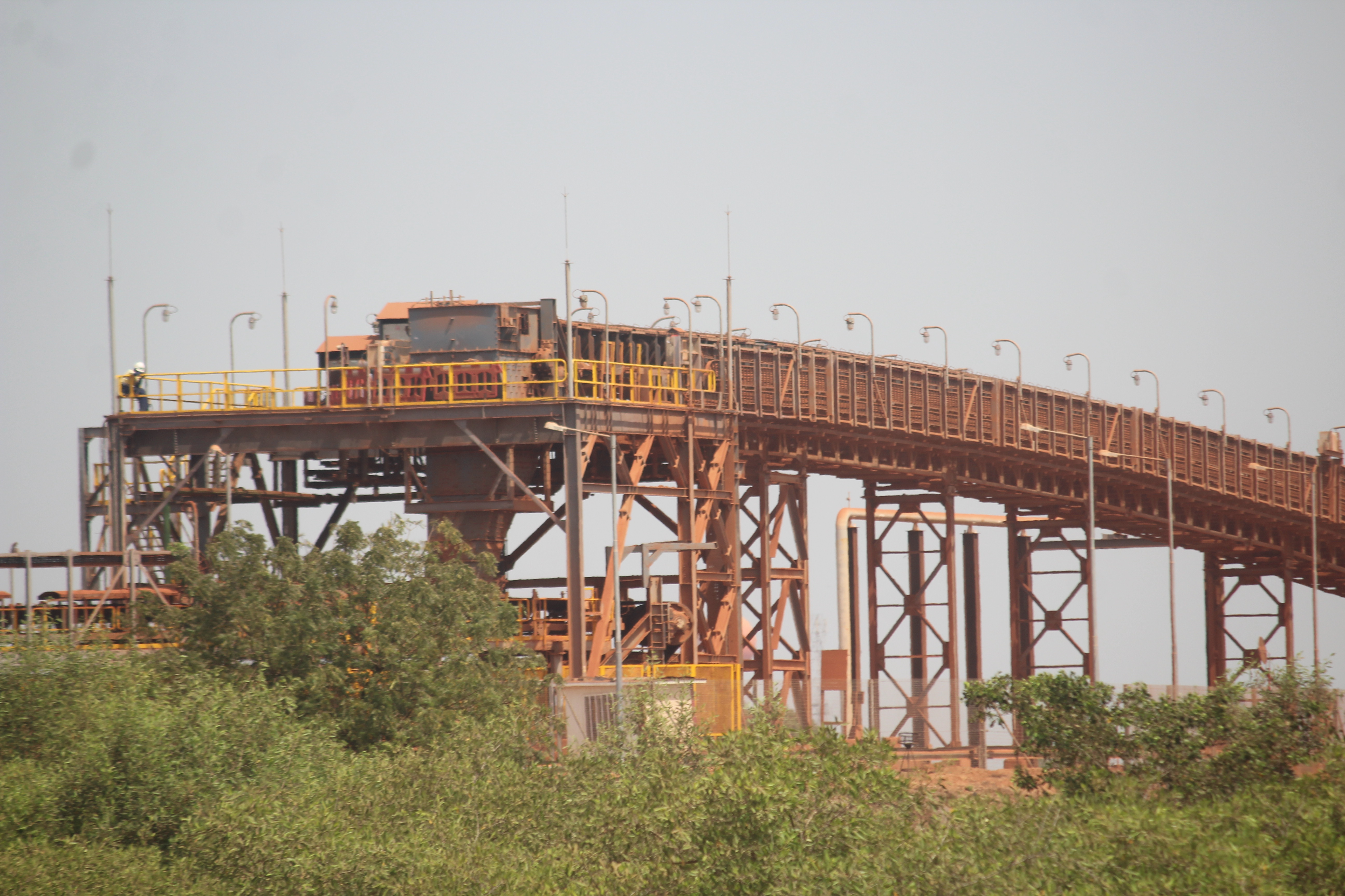 Tapis de GAC a kamsar This is an image with the theme "Africa on the Move or Transport" from: Guinea